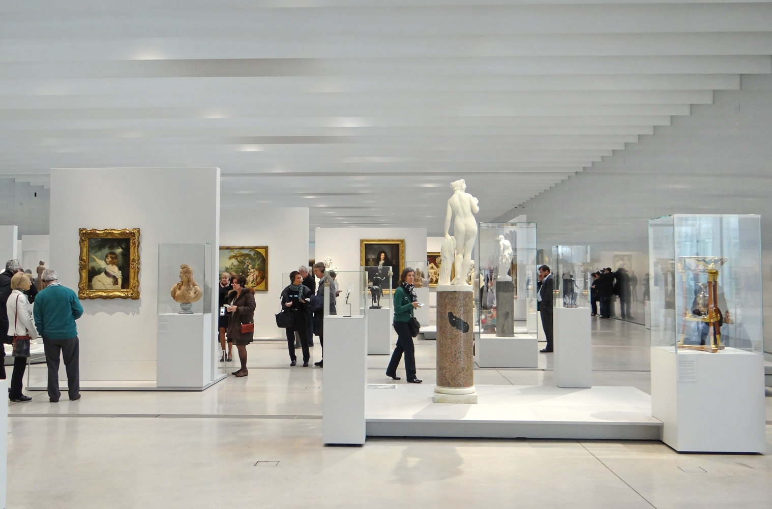 La Galerie du Temps vue de la sortie Studio Adrien Gardère, muséographe de la Galerie du Temps Agence SANAA (Kazuyo Sejima et Ryue Nishizawa) pour la conception architecturale du Louvre Lens Dans la Grande galerie ne sont confiées que des œuvres issues des collections du musée du Louvre, mais selon une présentation nouvelle : abandonnant la structuration classique en départements, les œuvres les civilisations, ce qui unit les pratiques artistiques. Par cette approche nouvelle, unique dans les musées encyclopédiques, par le rôle qui y est donné à la médiation humaine et multimédia et à la conquête des publics, par sa dimension expérimentale aussi, le Louvre-Lens est une chance pour le Louvre. Xavier DECTOT, Directeur du musée du Louvre-Lens Extrait du site officiel du Louvre Lens La muséographie de la galerie du Temps est une véritable innovation en matière de présentation des œuvres et de médiation culturelle. Elle marque une rupture avec la conception traditionnelle des musées d'archéologie et des beaux-arts et notamment avec le musée du Louvre à Paris où les œuvres sont dans des espaces cloisonnés, organisés par département. La libre circulation entre les différentes parties chronologiques de la galerie incite à la confrontation directe des œuvres exposées (peintures, sculptures, dessins, objets d'art, objets archéologiques,..) et facilite d'autant mieux l'appropriation par les publics que des panneaux d'information et des cartes par grande période ponctuent la déambulation. L'accès à la galerie du Temps est gratuit jusqu'à la fin de l'année 2013 par la volonté des collectivités territoriales qui assurent la tutelle de l'EPCC Louvre Lens.